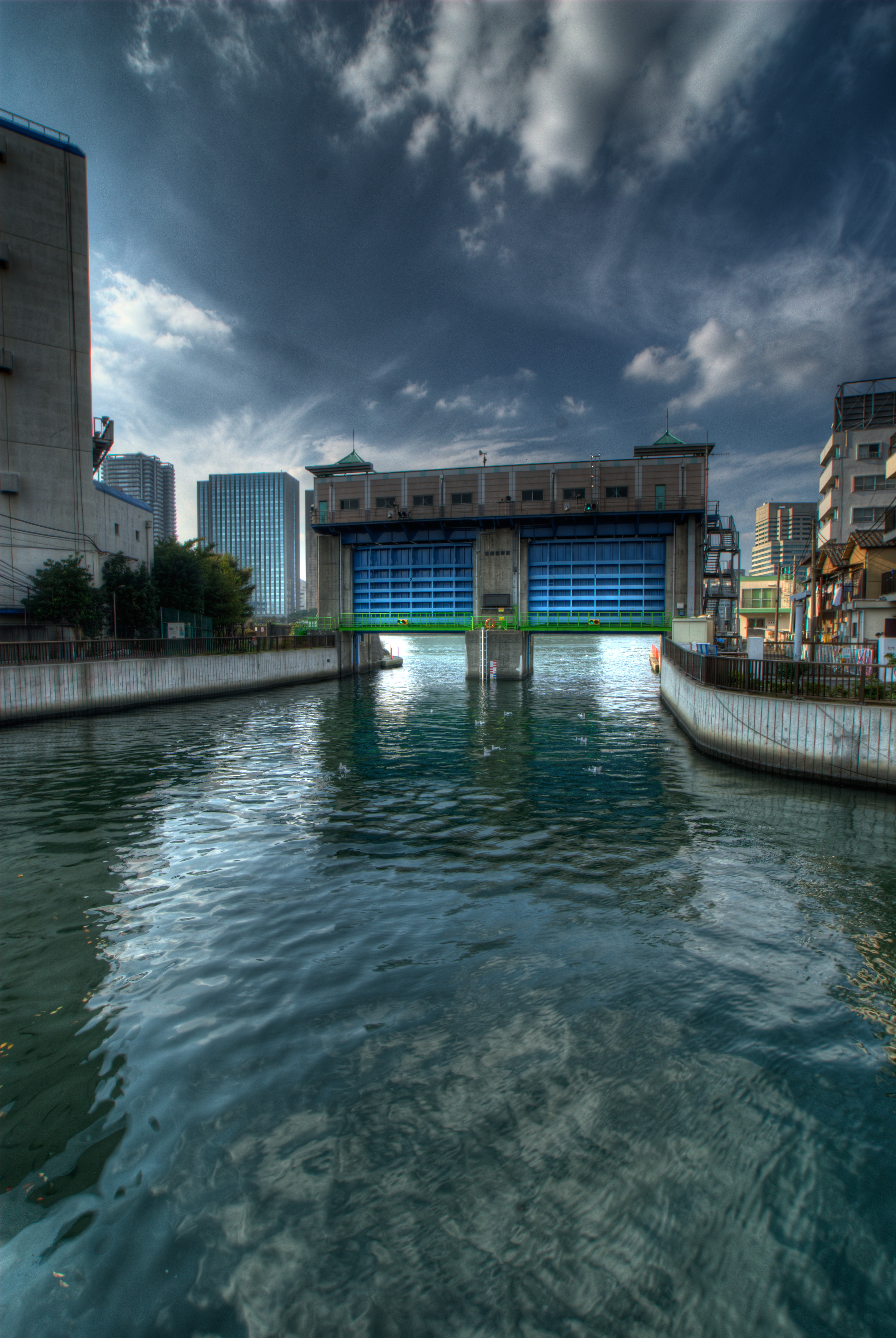 大横川の大島水門 (Oshimakawa sluice)